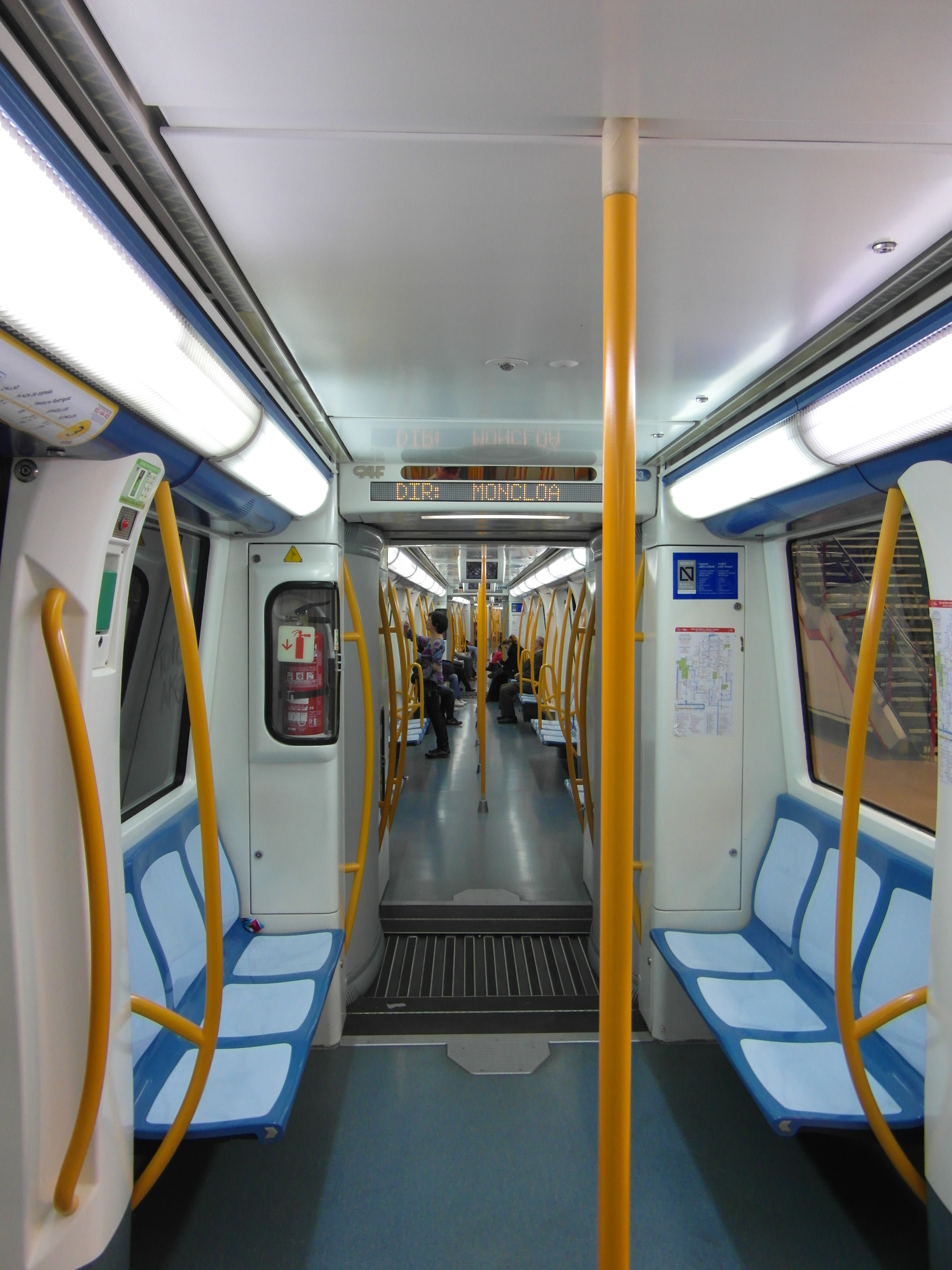 Madrid - Inside Metro